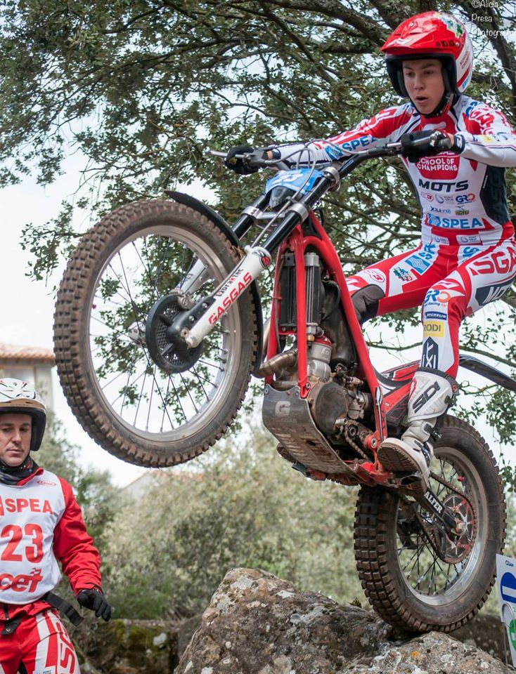 Trial 2016